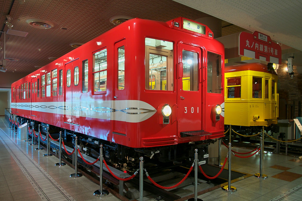 営団地下鉄300形301号。東京地下鉄博物館の保存車。